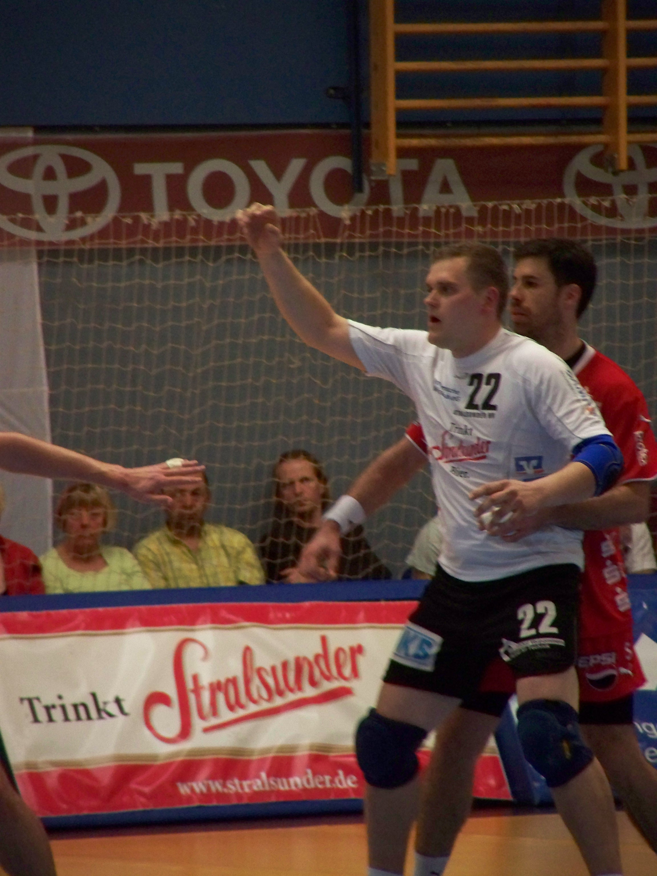 Der Handballspieler Sylvio Ney vom Stralsunder HV beim Bundesliga-Spiel gegen den MT Melsungen am 4. April 2009.